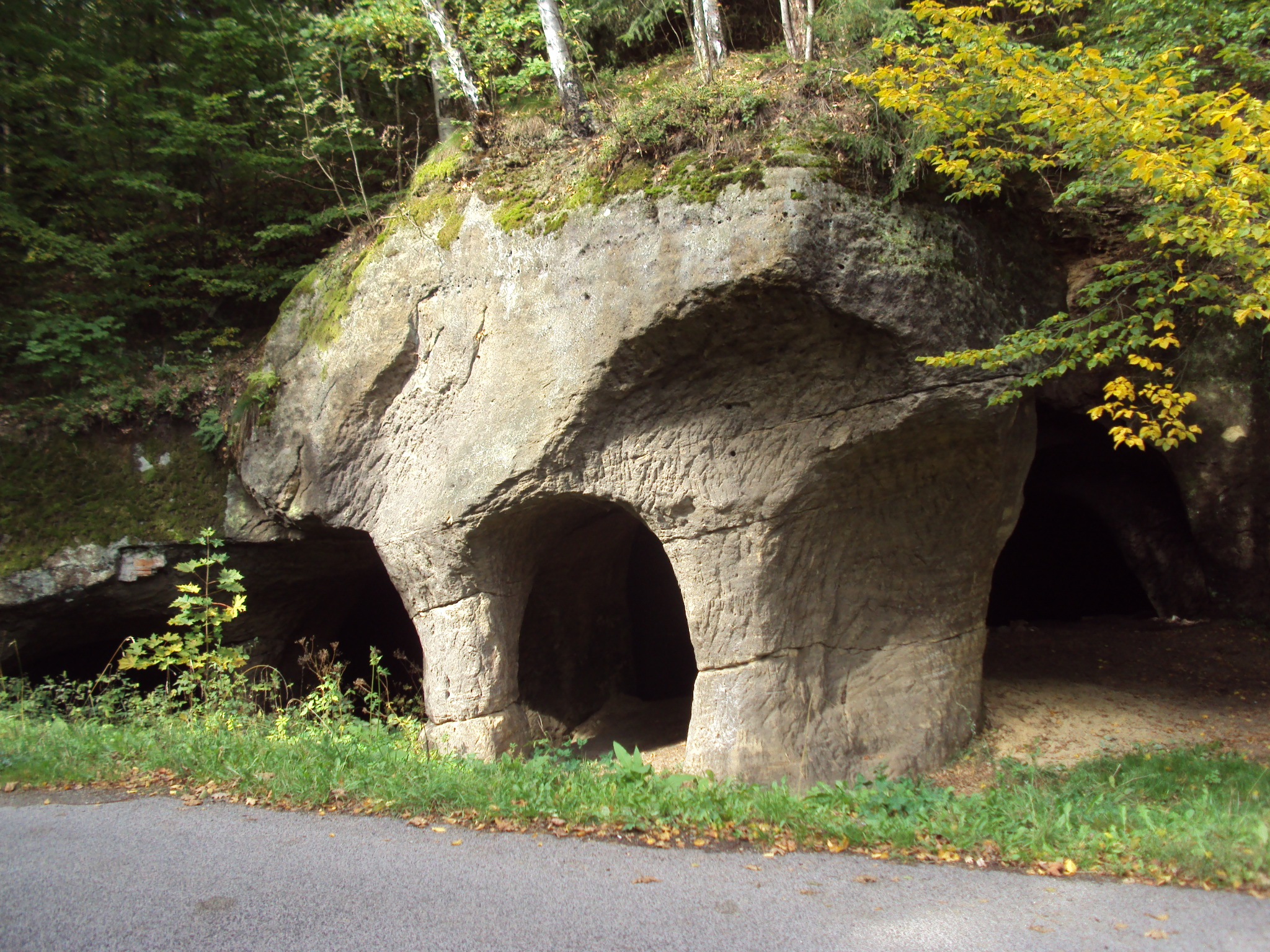 Jeskynní komplex u Svitávky